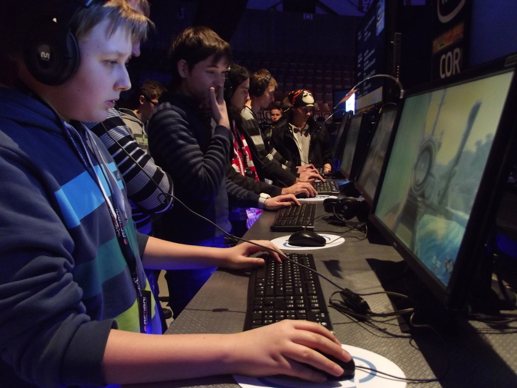 Zdjęcie zrobione podczas Intel Extreme Masters 2013 w katowickim Spodku.